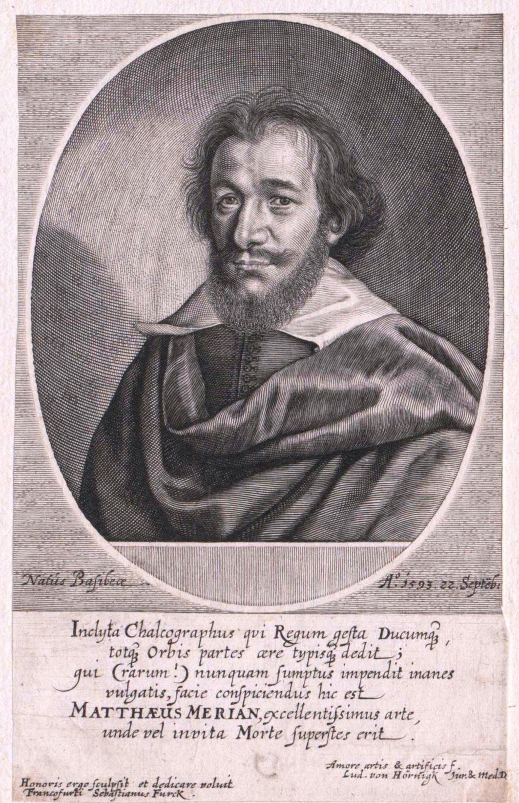 Matthaeus Merian (1593–1650), Stich von Sebastian Furck